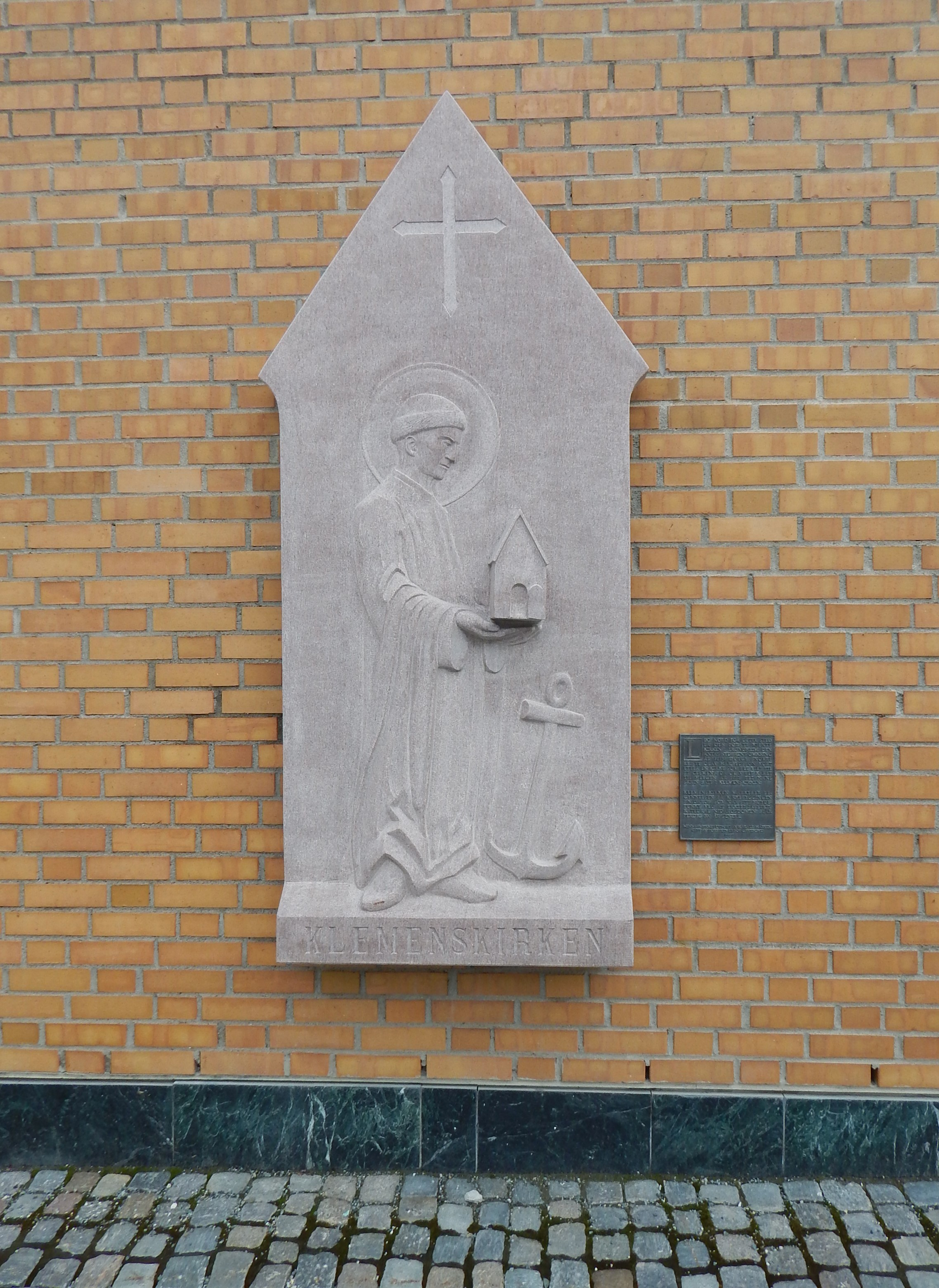 Minneplakett om Klemenskirken på veggen øst for Krambugata i Trondheim